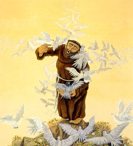 tecnica mista su cartone telato cm 80 x 69